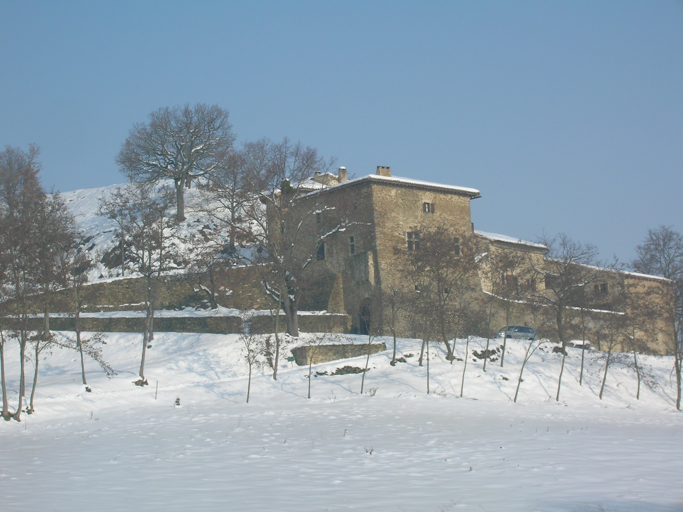 Rhône-Alpes, Château le Combet, La Répara-Auriples, Drôme